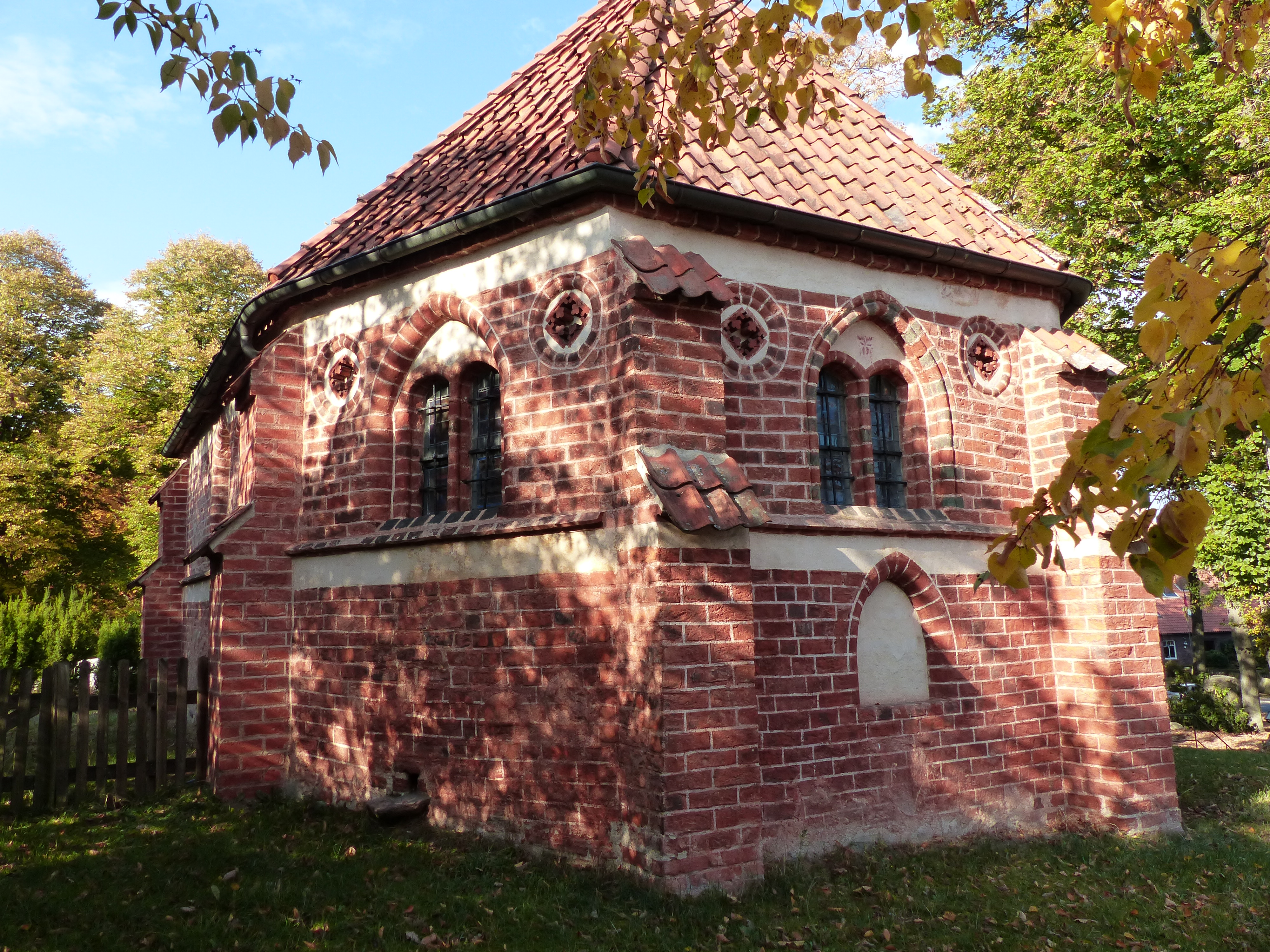 Johanniskapelle in Bokel (Sprakensehl) von Ostsüdosten